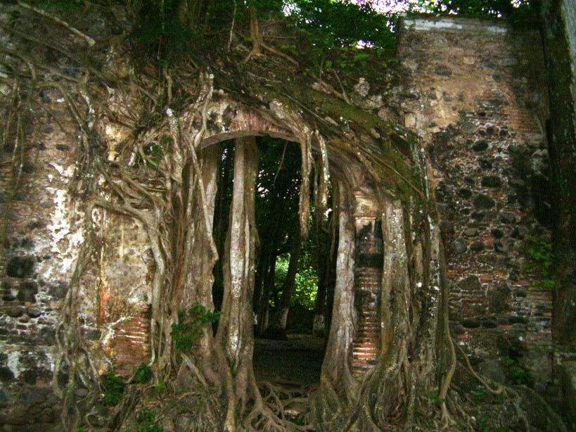 Restos de la casa de Hernan Cortes localizada en el Municipio La Antigua Veracruz, Mexico. Fotografia de la Puerta Principal.